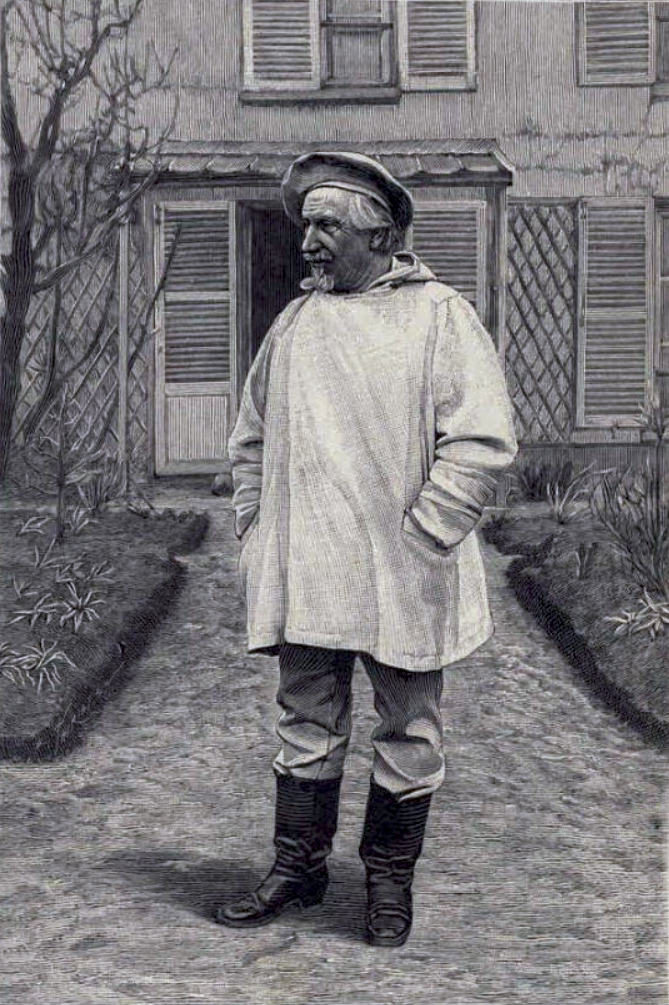 Gravure